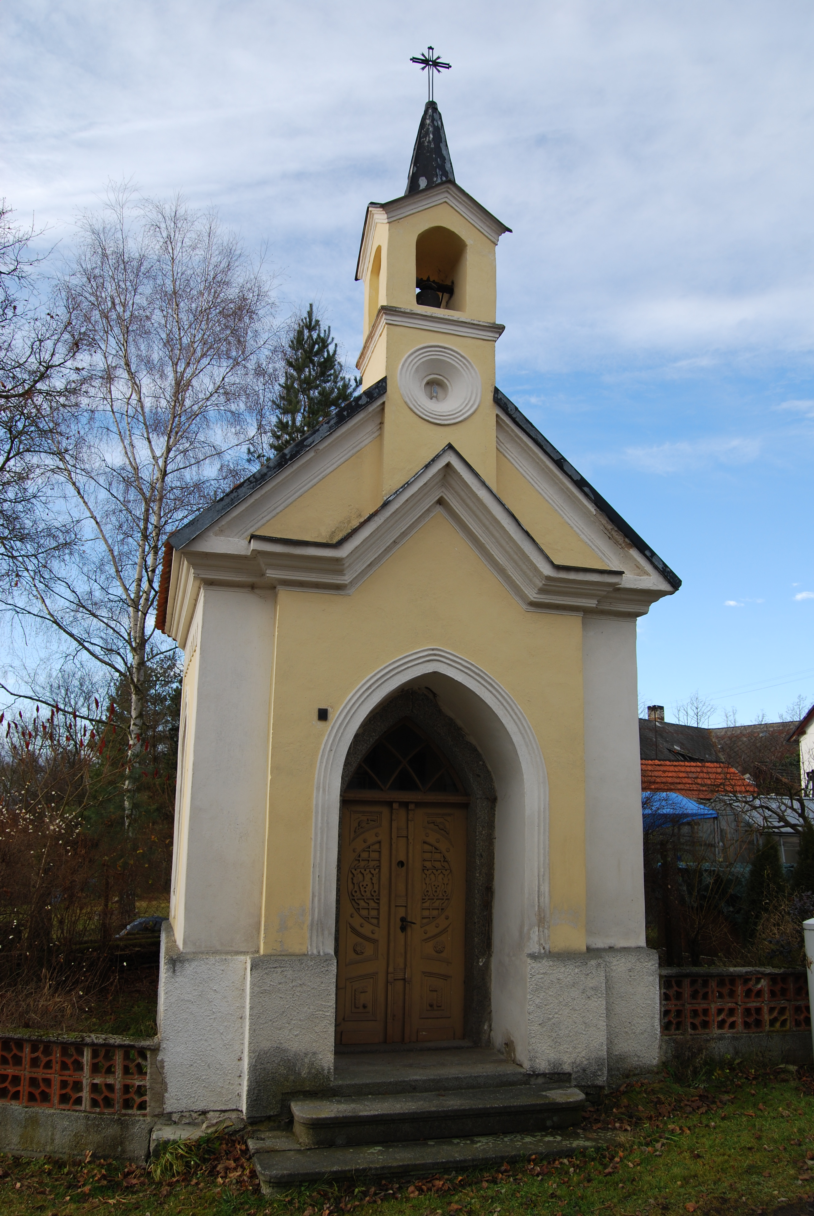 Kaple sv. Jana Nepomuckého v obci z roku 1906. Kotýřina (Kovářov). Okres Písek. Česká republika.